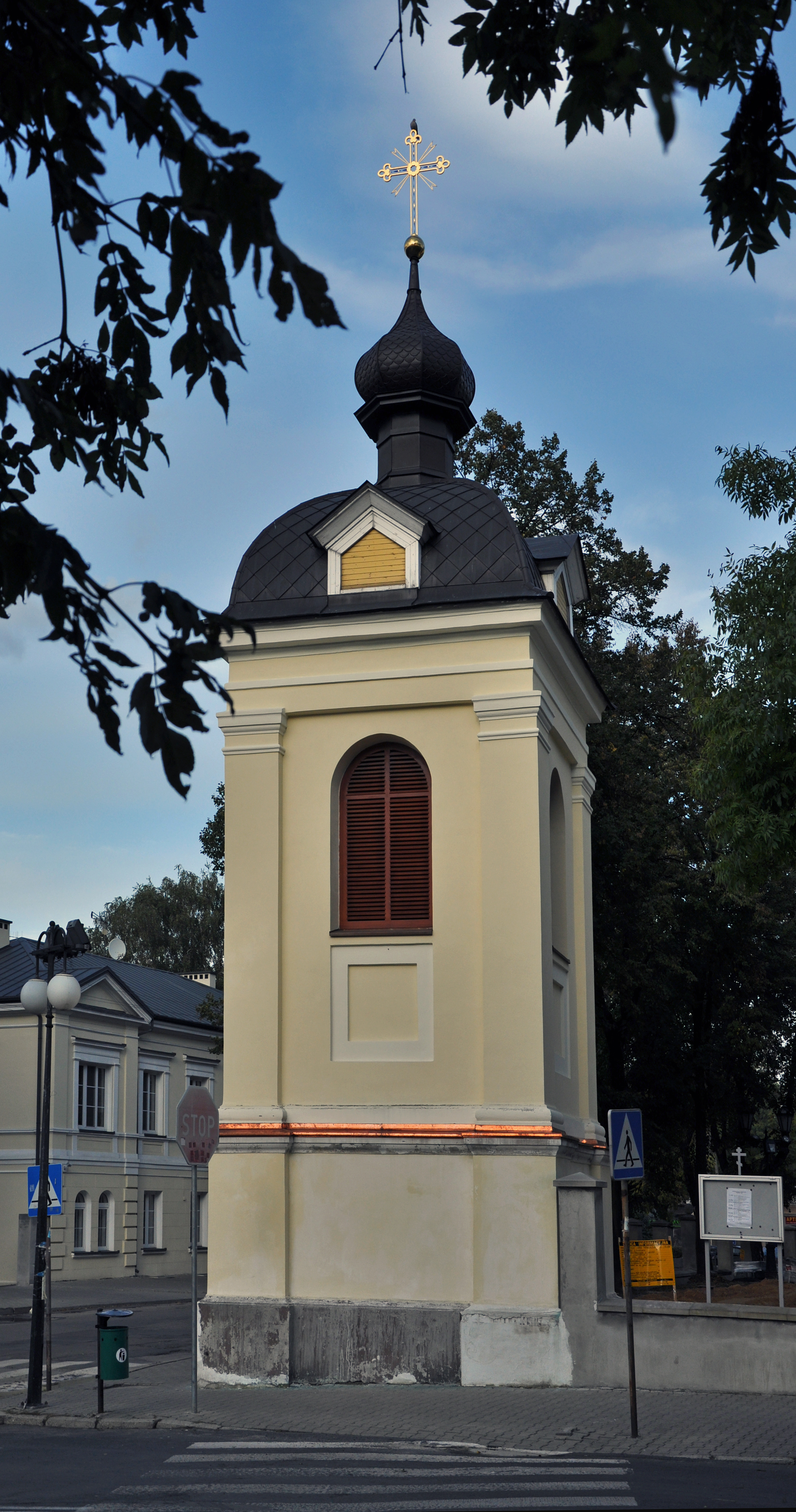 Chełm, dzwonnica, poł. XIX